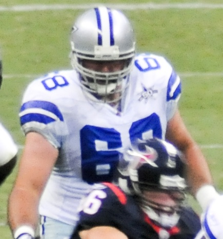 DSC_6974_LR